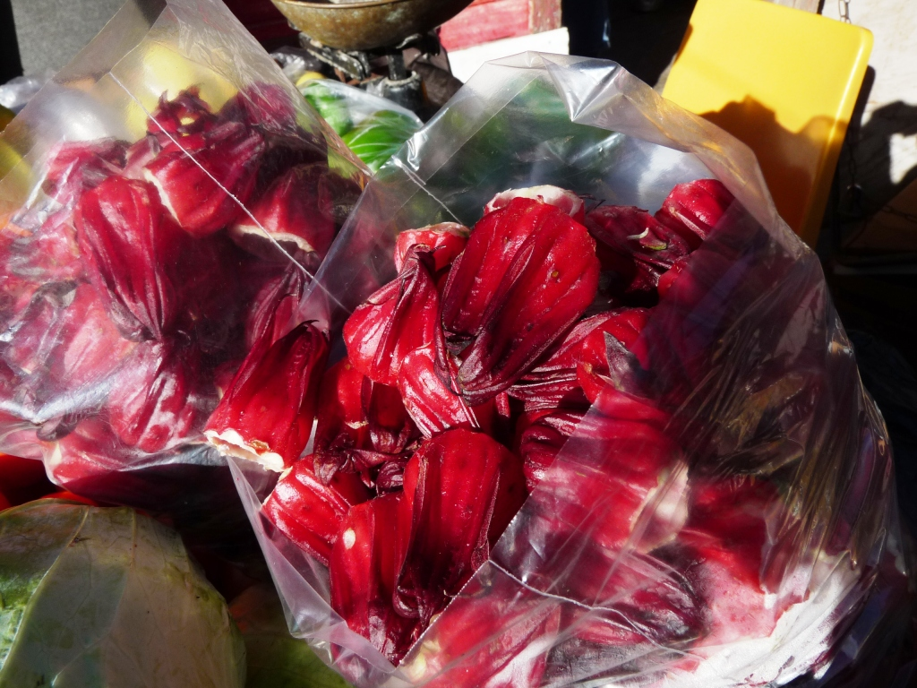 Roselle auf dem Markt in Grenada